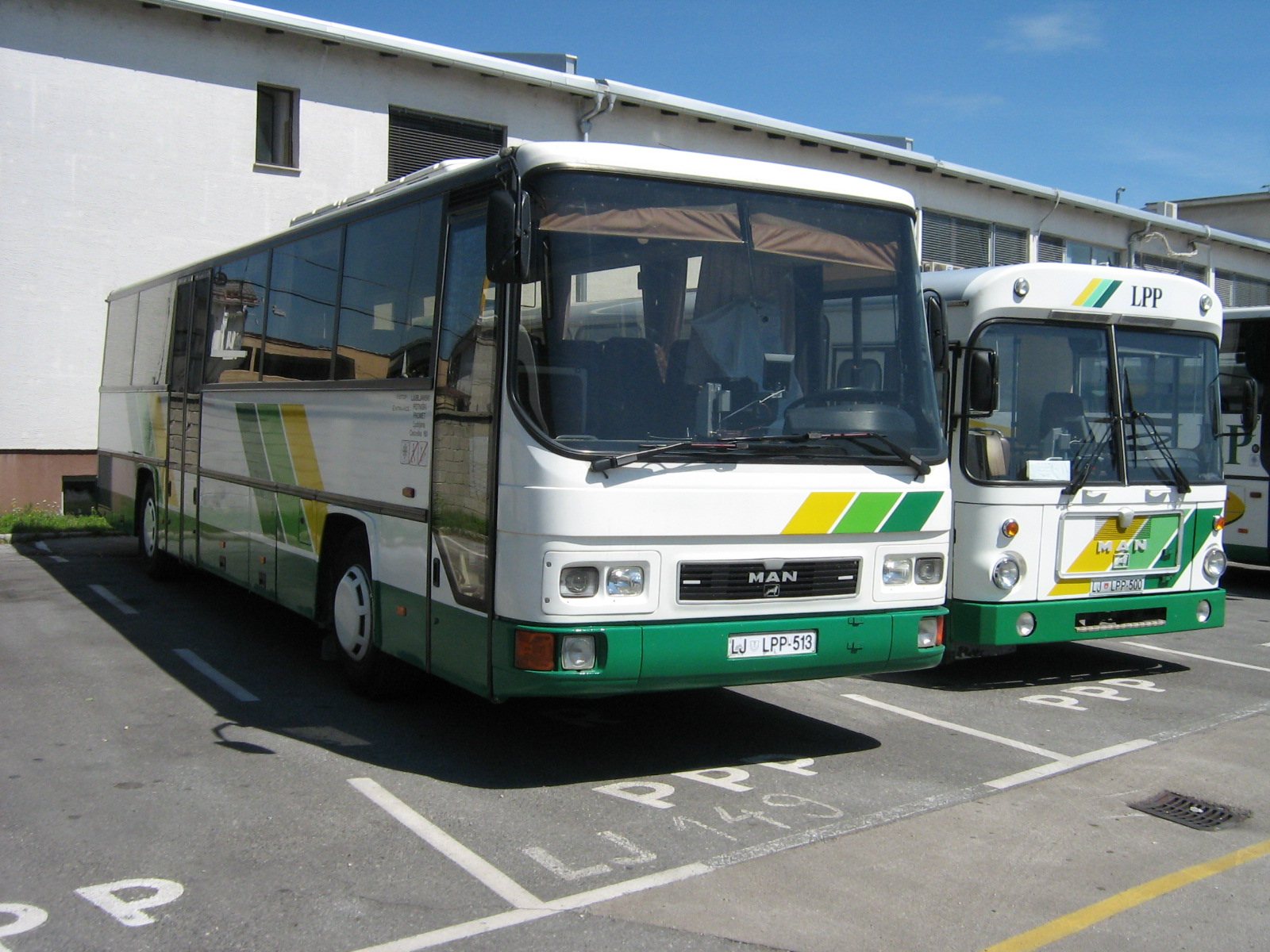 Avtobus MAN ÜL 312 v lasti Ljubljanskega potniškega prometa. Avtor: Uporabnik:BurekBuster